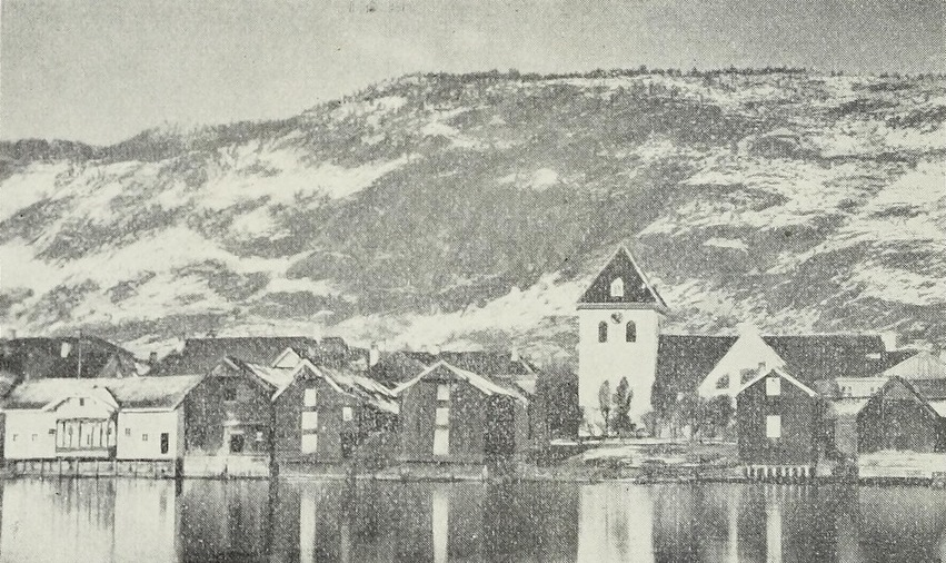 Bragernes (gamle) kirke med omgivelser før brannen i 1866. Fotografi gjengitt i Tor Pedersen: «Drammen 1811–1911» (Harald Lyche, 1911), s. 62.